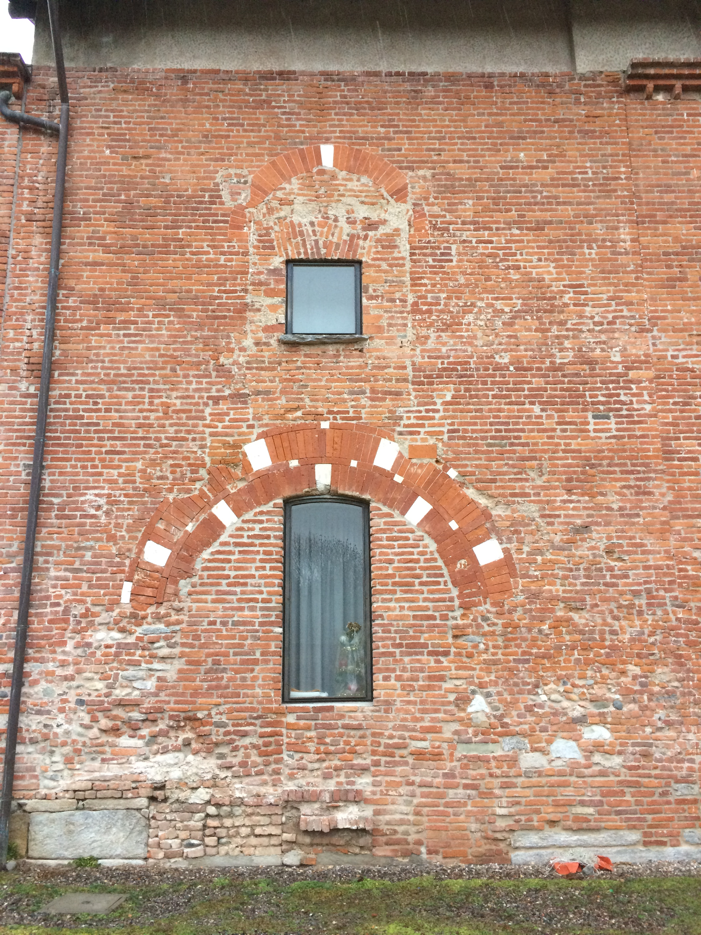 Castello di San Giorgio, Legnano